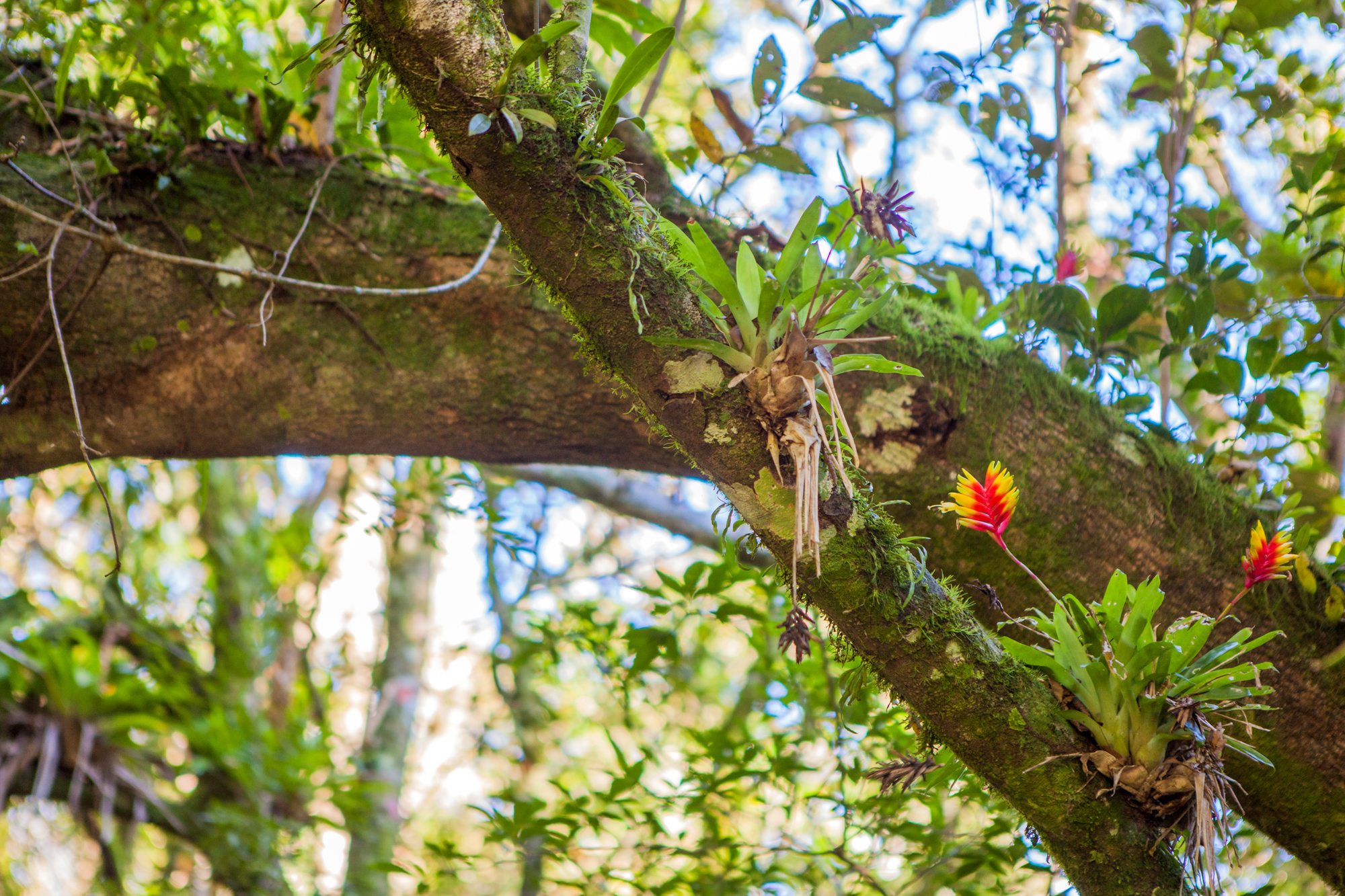 Uma Bromélia, planta da família Bromeliaceae, nativa da Mata Atlântica.